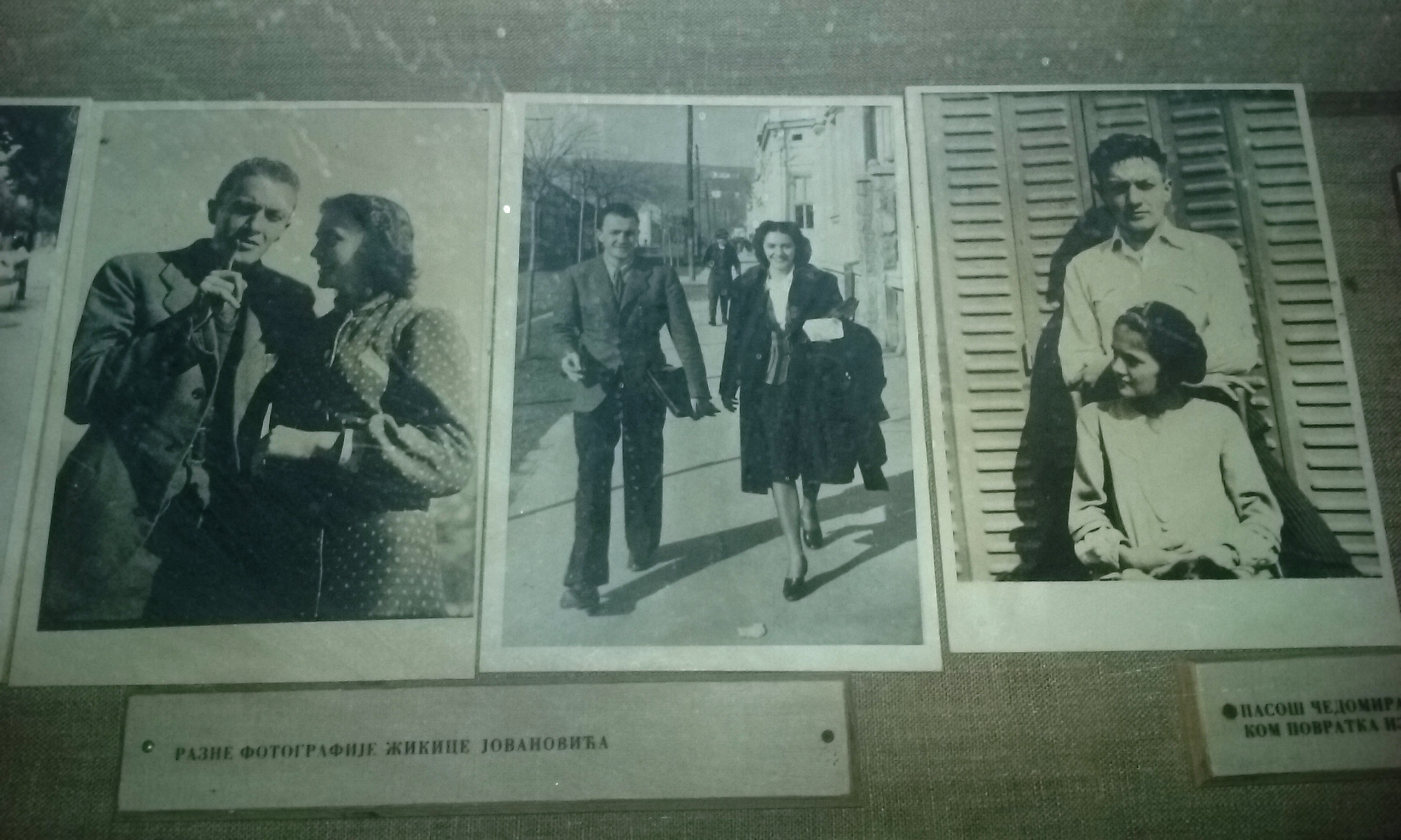 Фотографије Жикице Јовановића Шпанца из сталне поставке Музеја 7. јули 1941. у Белој Црви, код Крупња.